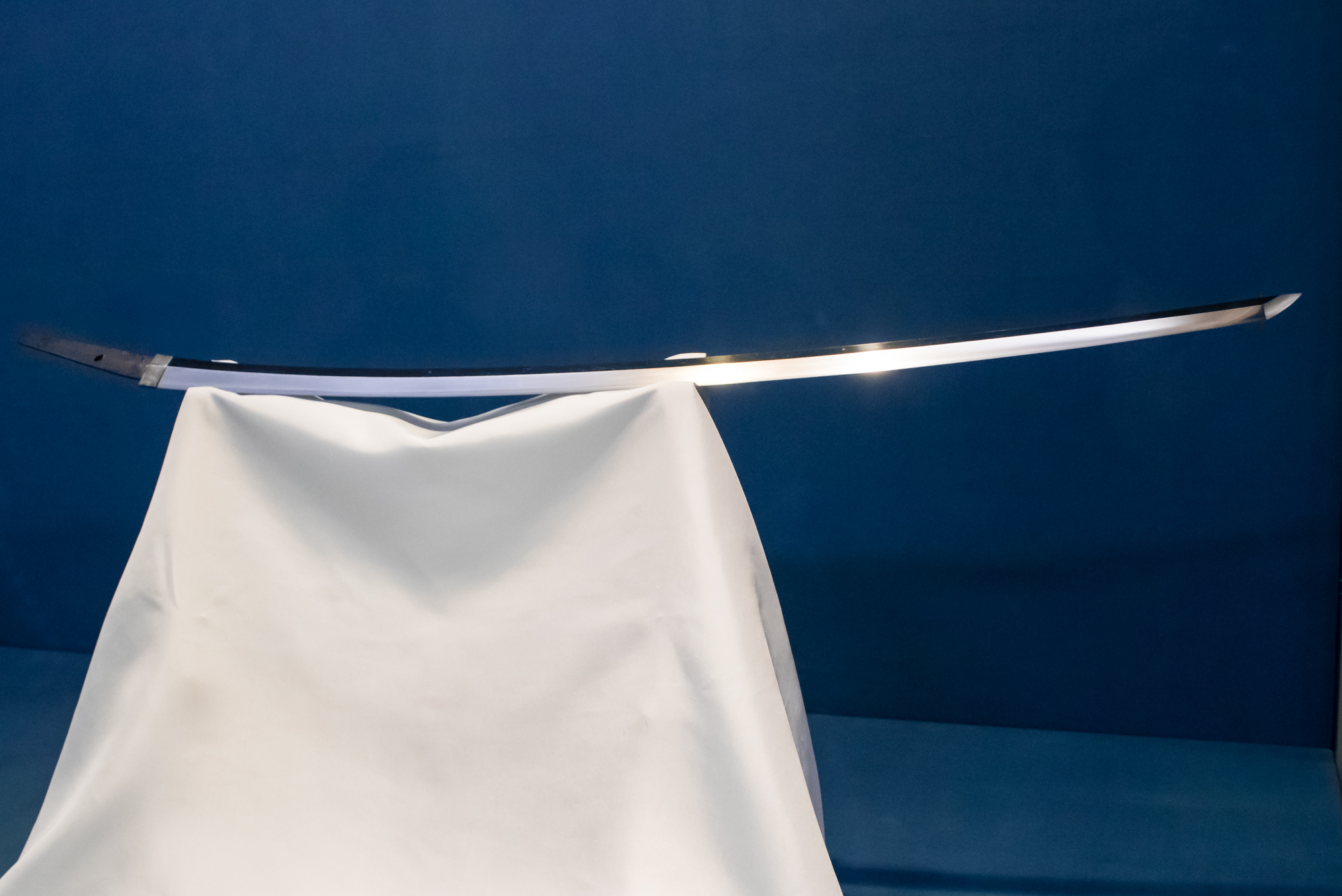 太刀「無銘 大和物」、号「獅子王」。重要文化財。平安時代、12世紀。